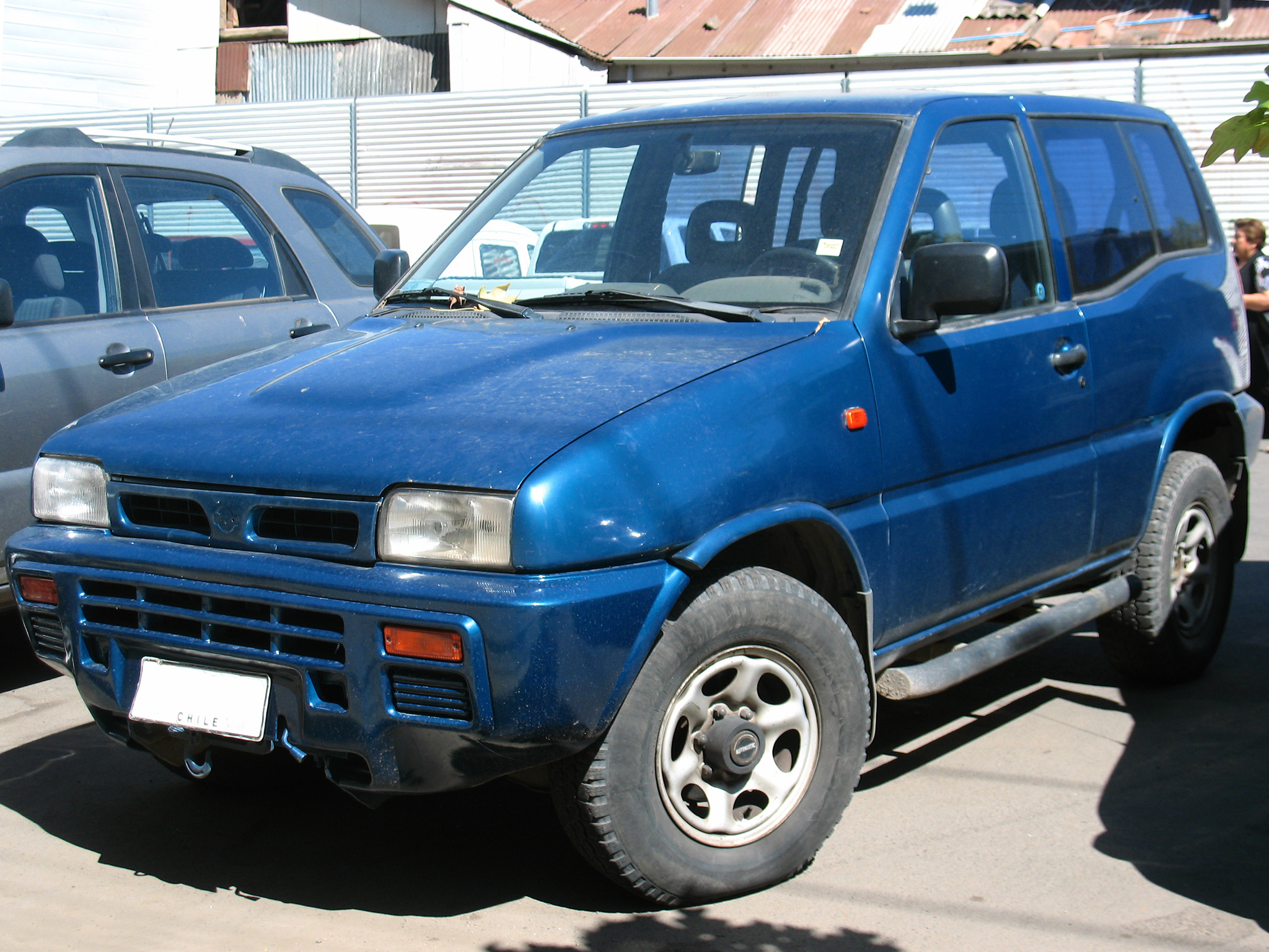 Nissan Terrano II 2.4 LX 1997